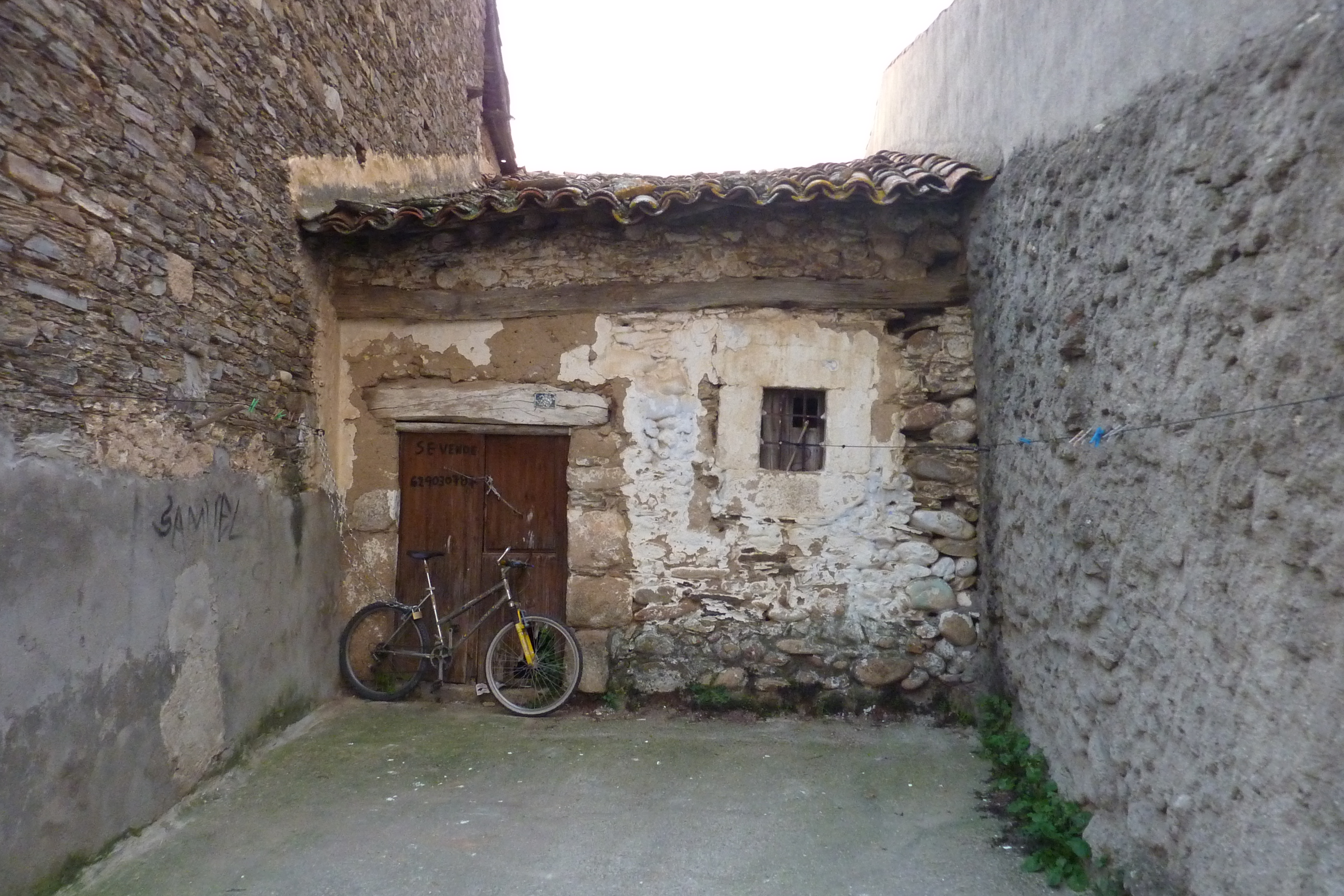 La Granja - courtyard